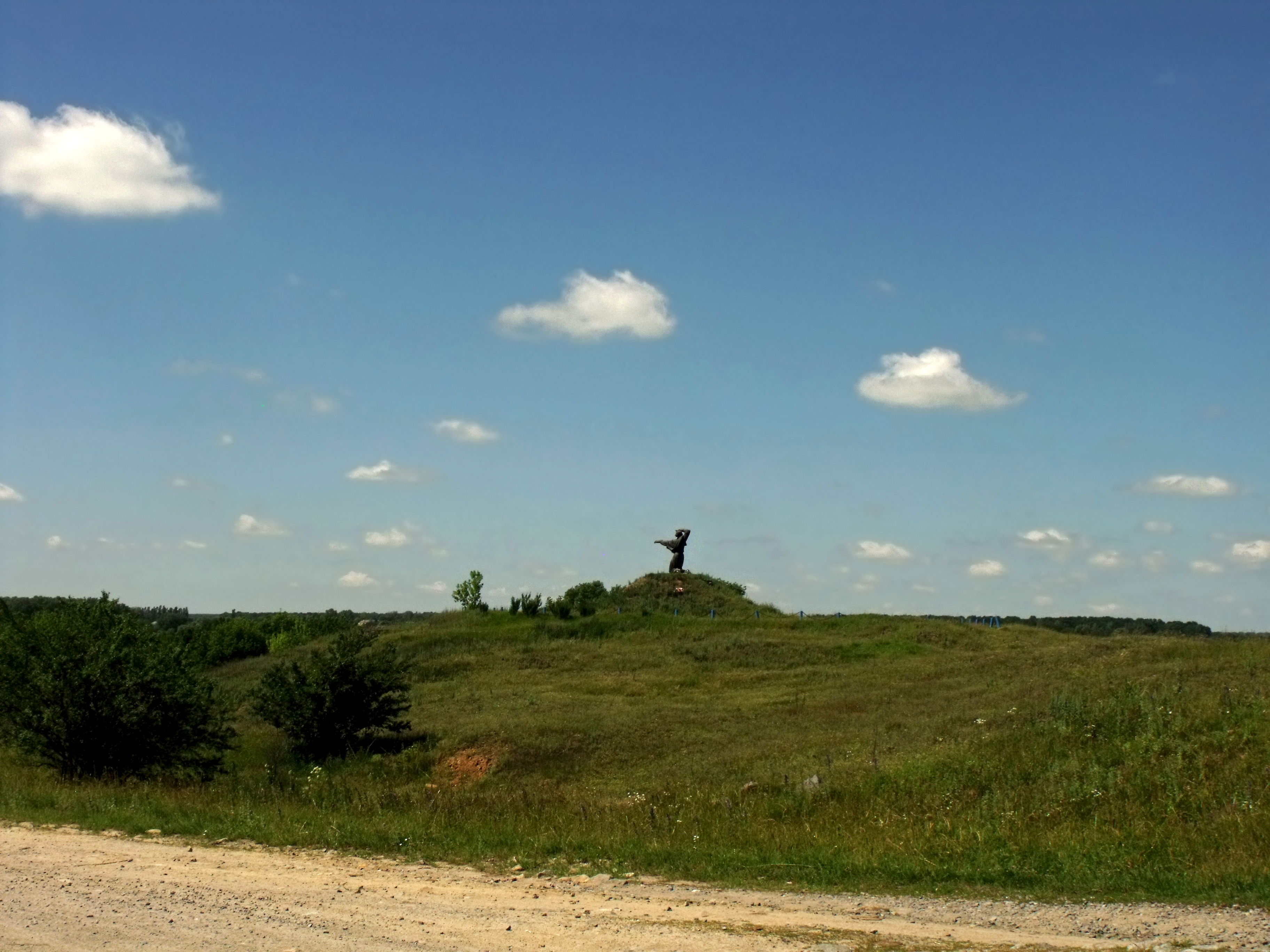 Слов’янське поселення, Уладівка